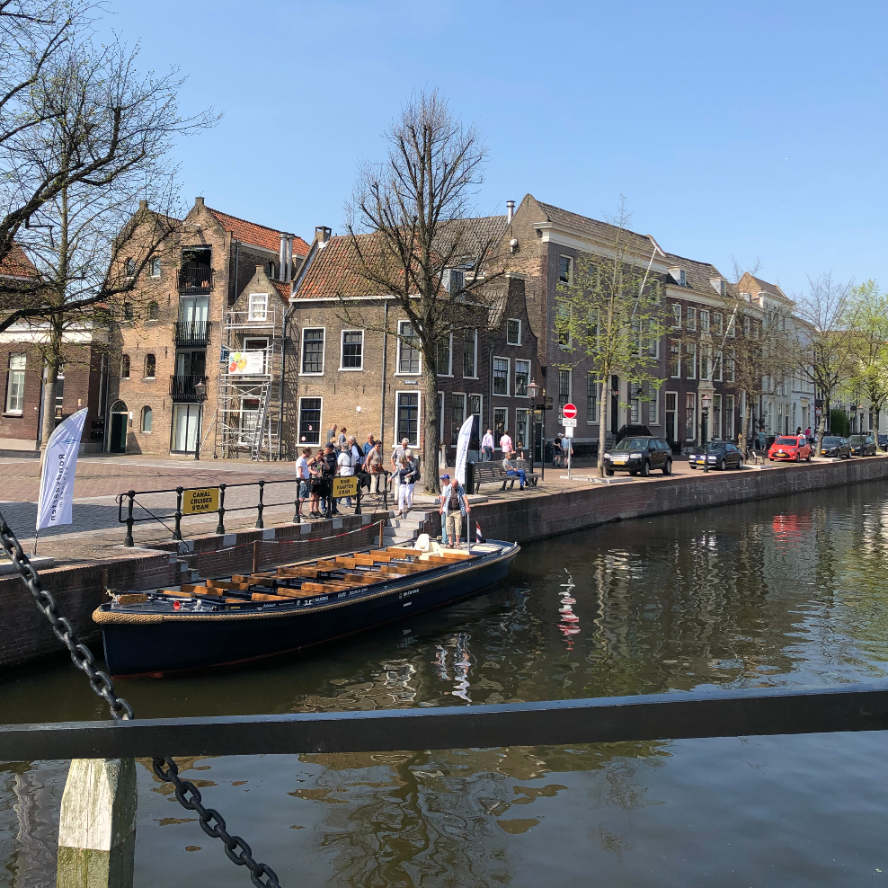 Deze foto is genomen op 21 april 2018 en toont de rondvaartboot (Fluisterboot) van Schiedam en haar opstapplaats.